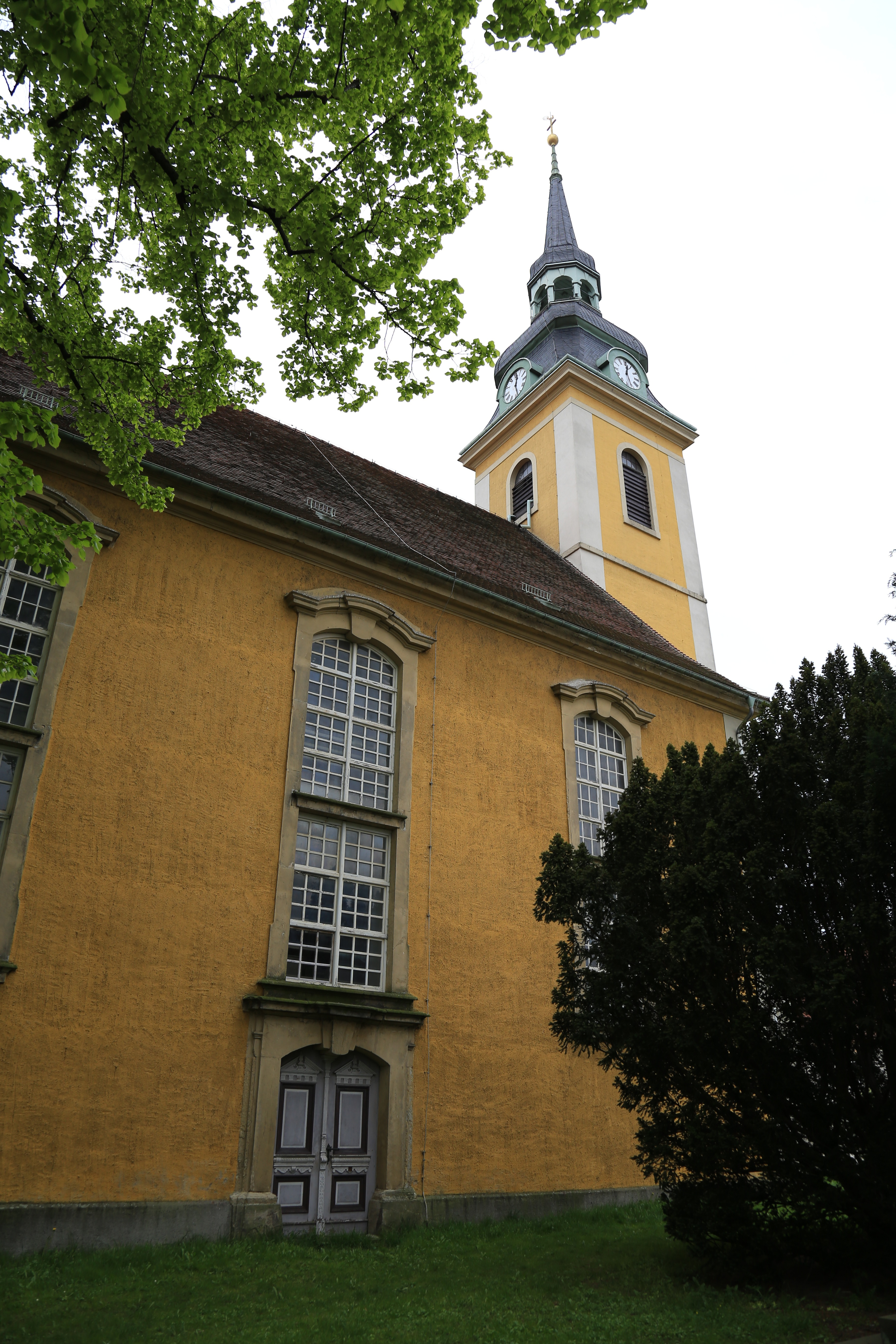 Kirche Elstra Mai 2017 (3)